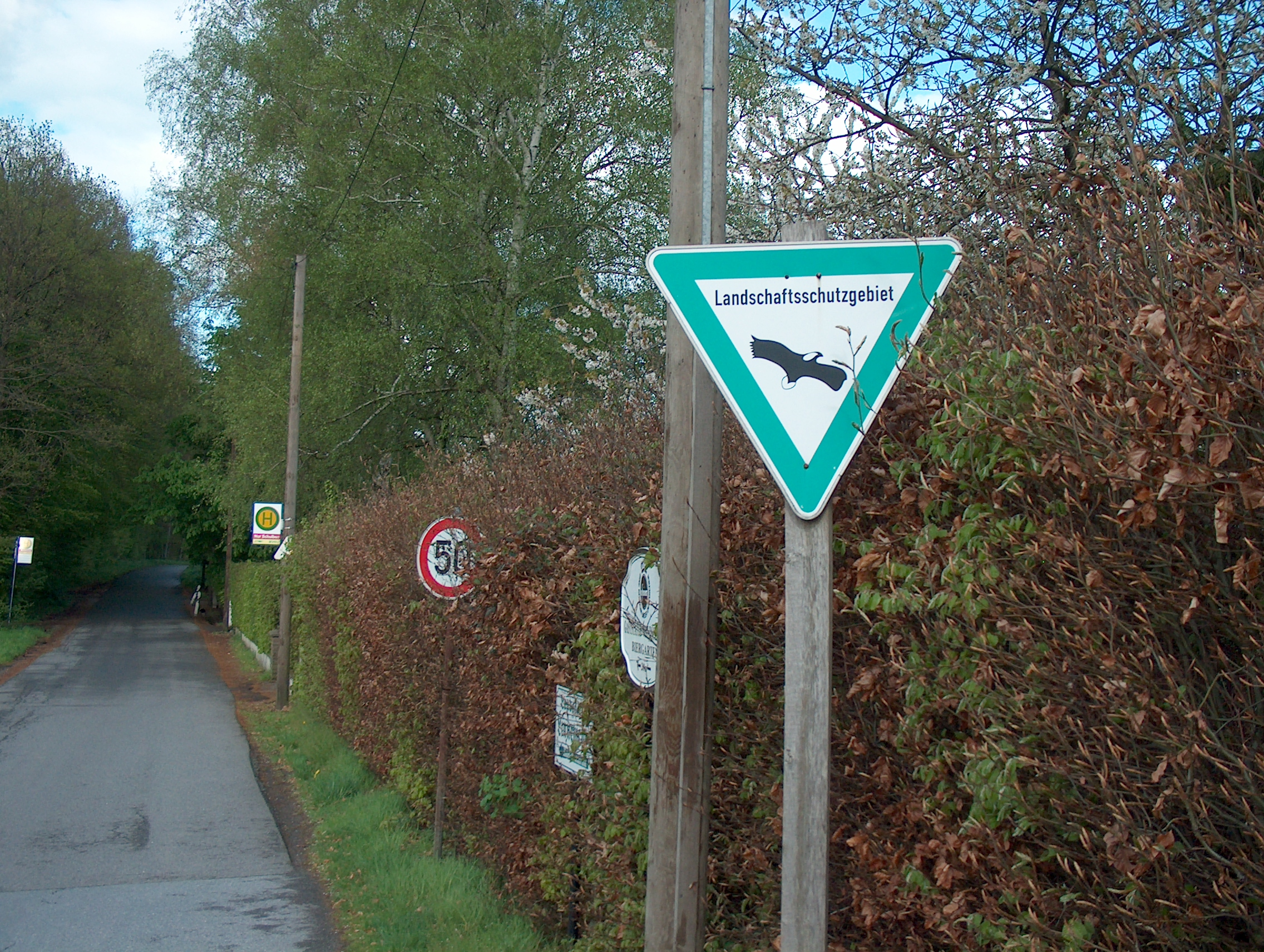 Schild „Landschaftsschutzgebiet“ am Michaelisweg (Nähe B236) in Ergste (Schwerte, Kreis Unna), Landschaftsschutzgebiet „Stüppenberg-Ergste“